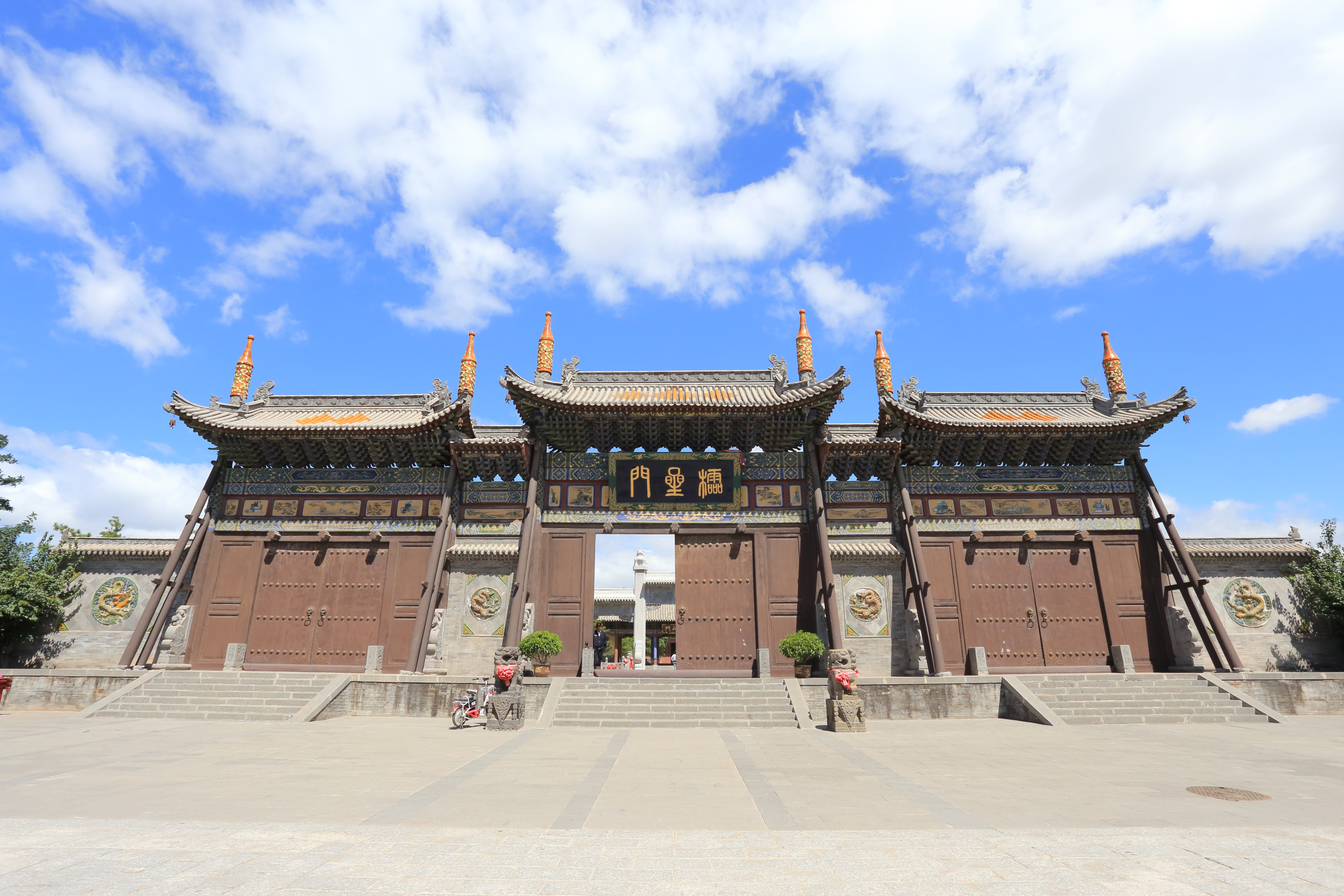 大同府文庙—— 棂星门